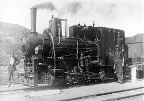 Локомотив серії U 35 на станції Кушниця